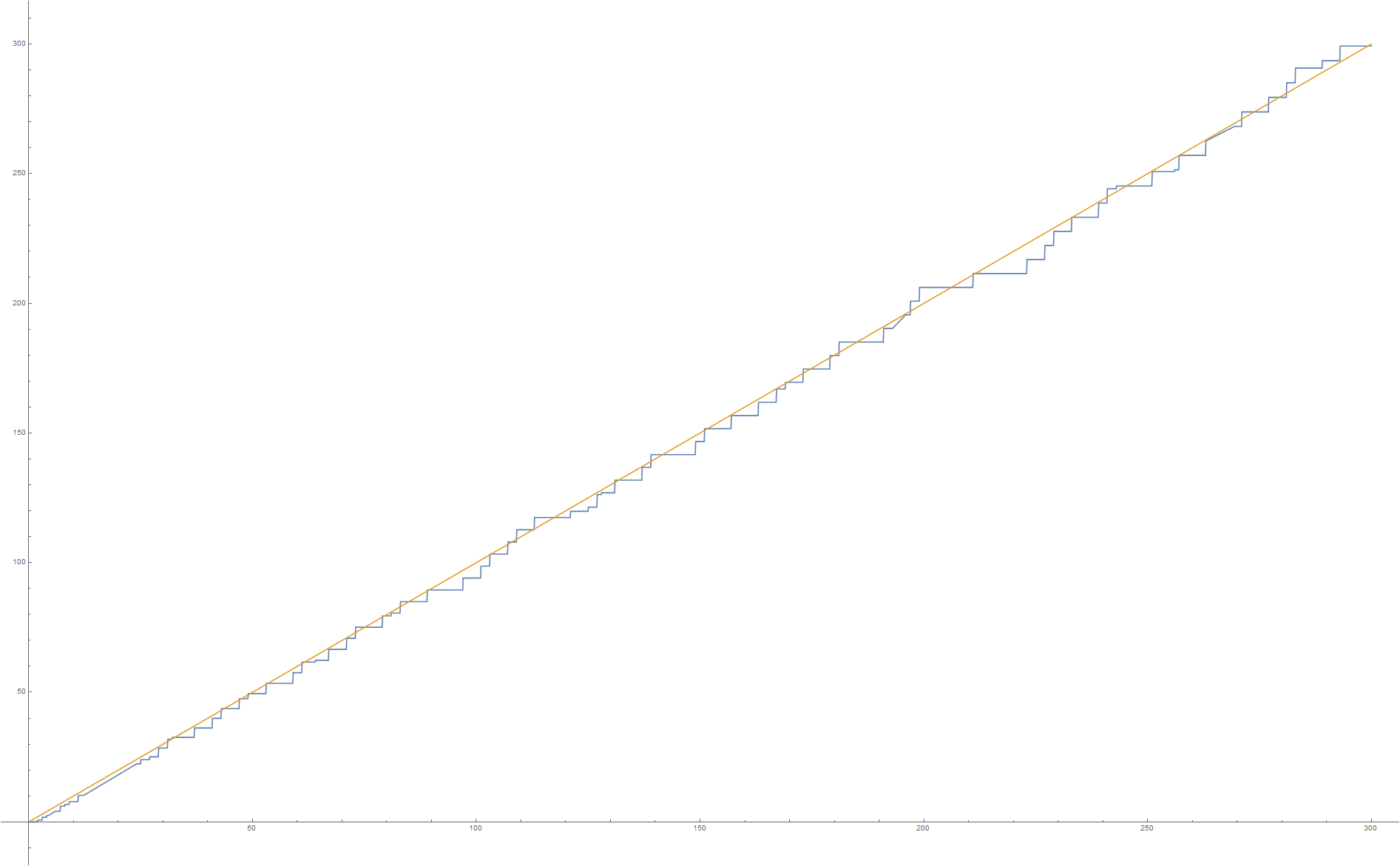 第二切比雪夫函数与y=x的对比